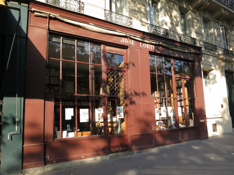 Façade le la librairie José Corti, 11 rue Médicis à Paris